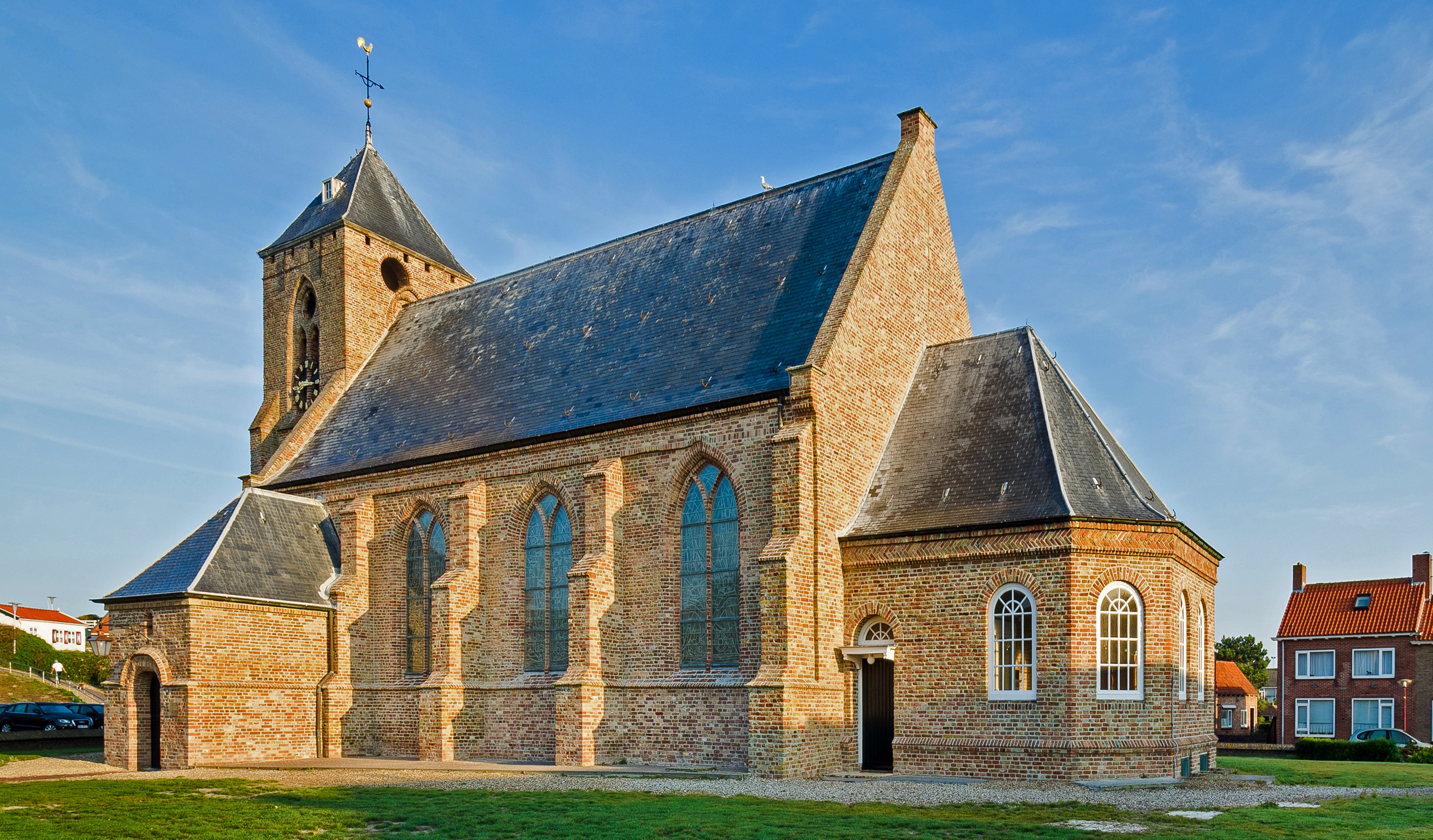 Kerk Zoutelande (Zeeland) zuidzijde